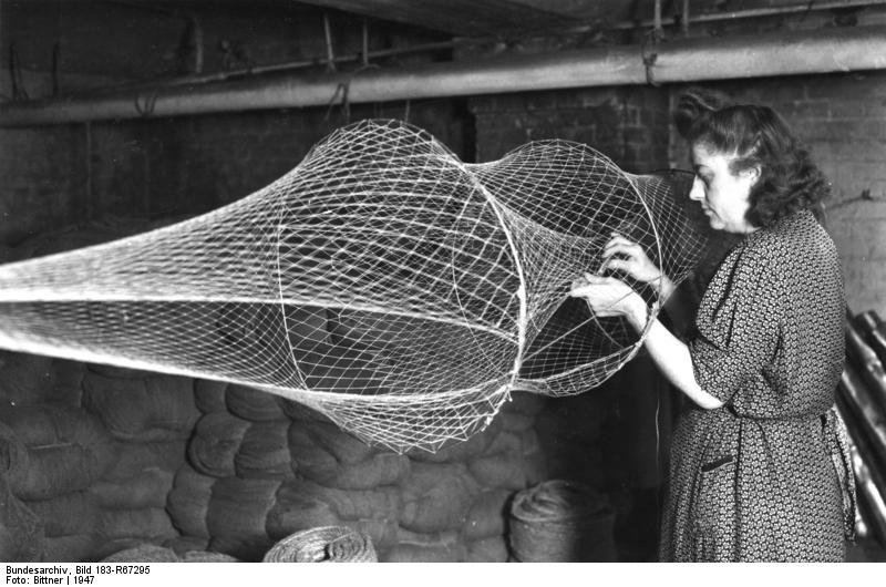 Berlin, Netzknüpferei Illus-Bittner Fischernetze werden in Berlin angefertigt, 26.8.47 Es klingt vielleicht etwas sonderbar, wenn man hört, daß die verschiedenen Netzarten für die Berufsfischerei - ob an der Seeküste oder den Binnengewässern - in einer Berliner Werkstatt geknüpft werden. Der Verbrauch an Netzen ist z. Zt. größer als in normalen Zeiten, weil es an den geeigneten Präparierungmitteln wie Teer und Karbolineum, mangelt. Flachs und Baumwolle, die Hauptbestandteile der Netze, die heute geknüpft werden, kommen aus Sachsen. Fleißige Frauenhände sind in der Berliner Werkstatt bei der Arbeit. Mit Schiffchen und Bleistift werden aus dicken Garnrollen die Maschen zum Fischernetz aneinandergereiht. Eine geübte fleißige Netzmacherin bringt es bis zu 1600 Knoten in der Stunde. Neben den feingarnigen Stellnetzen werden Reusen und Zugnetze, letztere zum Abfischen der Gewässer, geknüpft. Geliefert werden die Netze in alle Gebiete der russ. Zone. Oft kommen die Fischer aber selbst nach Berlin, um den Einkauf vorzunehmen. U.B.z.: Letzte Handgriffe an einer Flügelreuse. 796-47